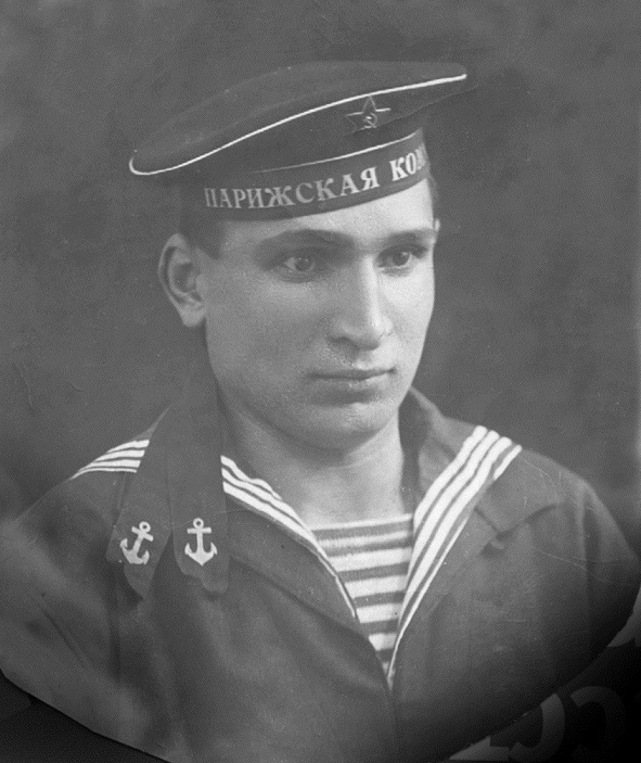 Белов Леонид Иванович - до начала войны проходил службу на линкоре "Парижская Коммуна" ("Севастополь"), Черноморский Флот. С началом войны - Морская пехота. Участник обороны Одессы (Григорьевсий десант) и Севастополя. Раненым был эвакуирован из Севастополя. Член ВКП(б) - КПСС. Награждён медалями "За оборону Одессы", "За оборону Севастополя", "За оборону Советского Заполярья" "За боевые заслуги", 2 орденами "Красная Звезда", 2 орденами "Великая Отечественная война II степени", орденом "Великая Отечественная война I степени". Закончил службу в рядах Советской Армии в звании подполковник. Похоронен в селе Кяппесельга, Республика Карелия.